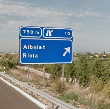 Cartell eixida autovia Albalat